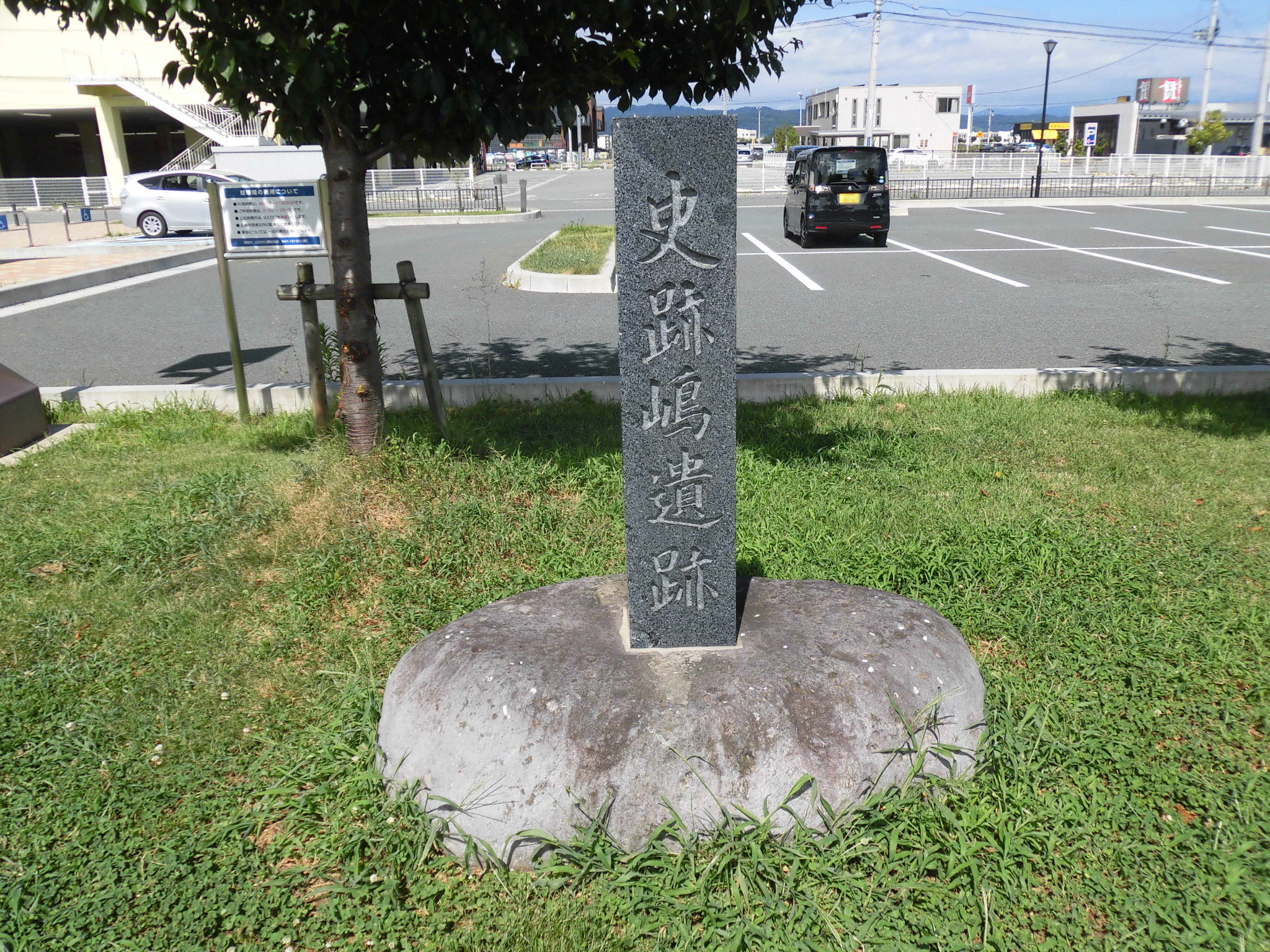 嶋遺跡公園。山形県山形市嶋。古墳時代後期の集落跡。1966年（昭和41年）に国指定史跡。土地区画整理事業に伴い遺跡公園として整備。石碑は国指定時に建立されていたものが、公園整備に伴い移設。